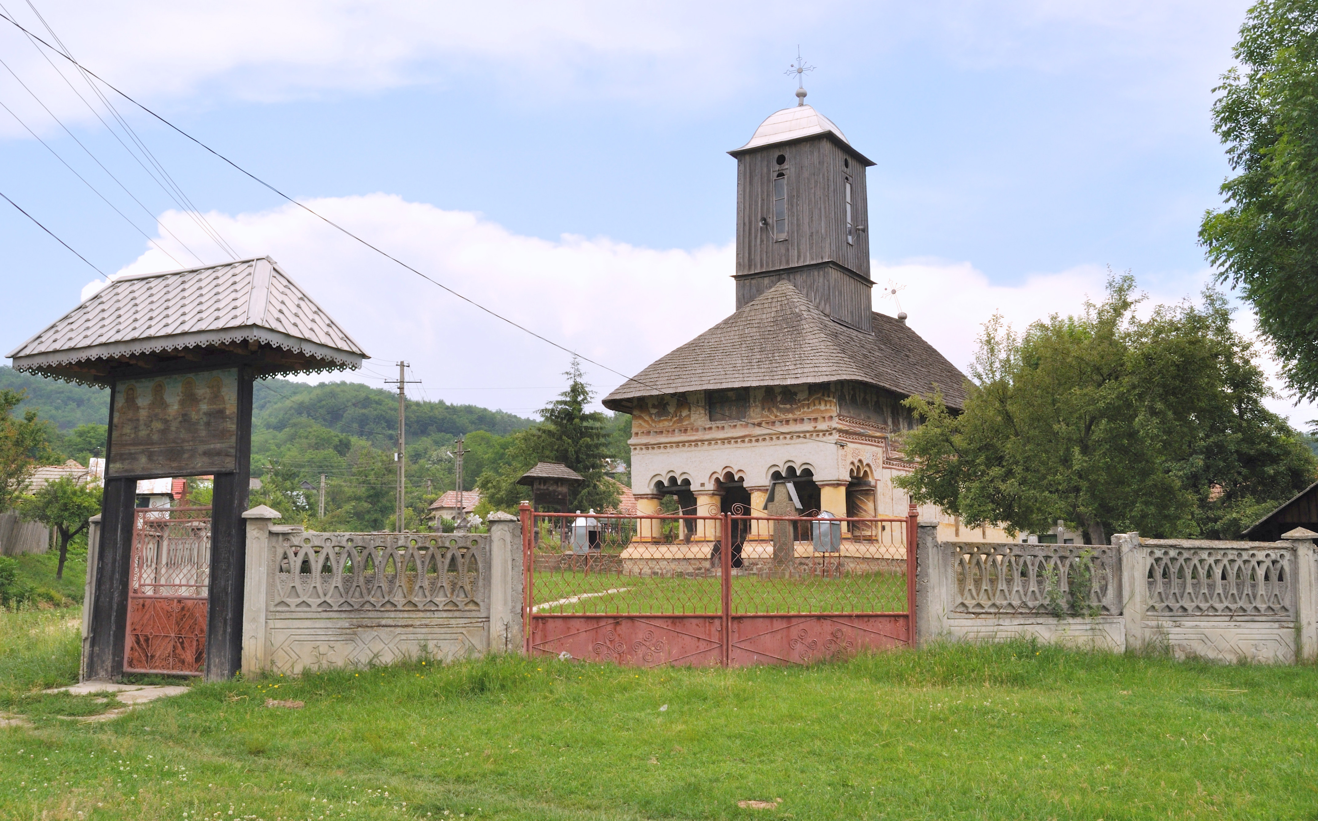 Biserica monument „Sf.Trei Ierarhi” din Genuneni, Vâlcea